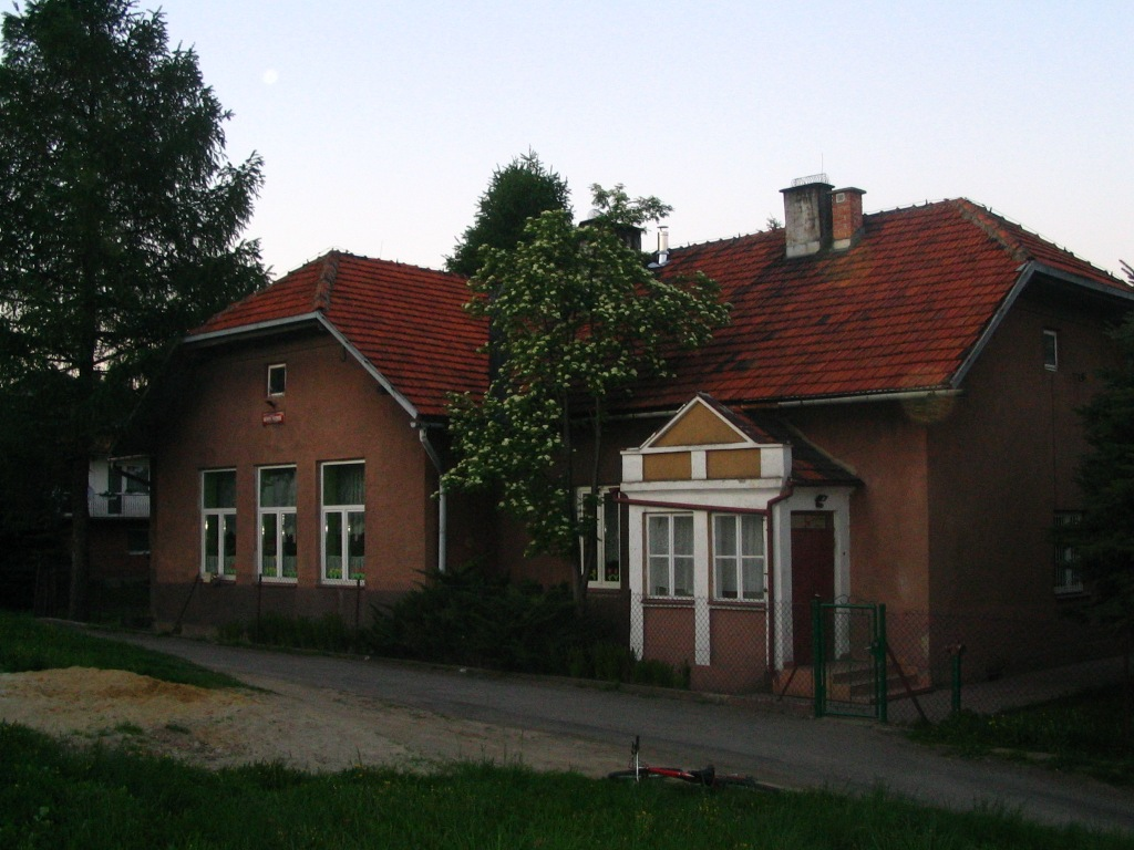 Szczytniki (pow wielicki)-przedszkol